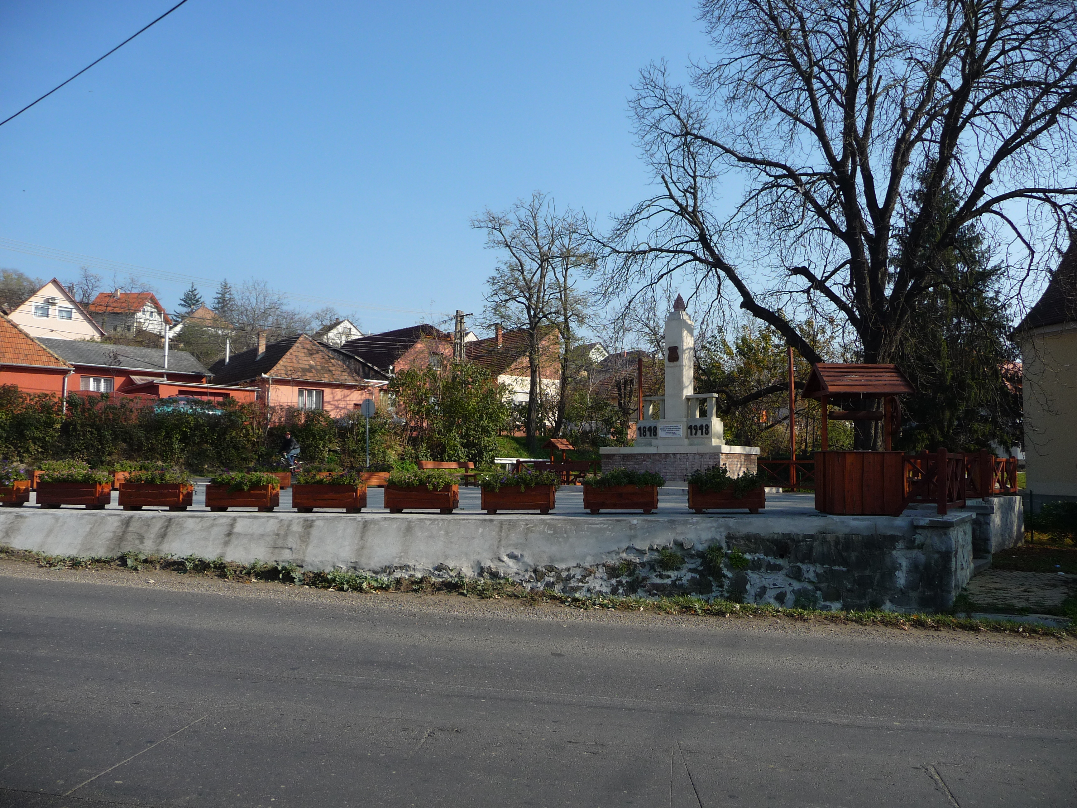 1848-49-es emlékmű (1949). A Petőfi és a Kossuth Lajos utca sarkán állt. Jelenlegi helyére 2011-ben helyezték át. Helyi védelemre javasolt a településképi kézikönyv alapján. - Pest megye, Aszód, Tabán tér, Hrsz.: 318/2.